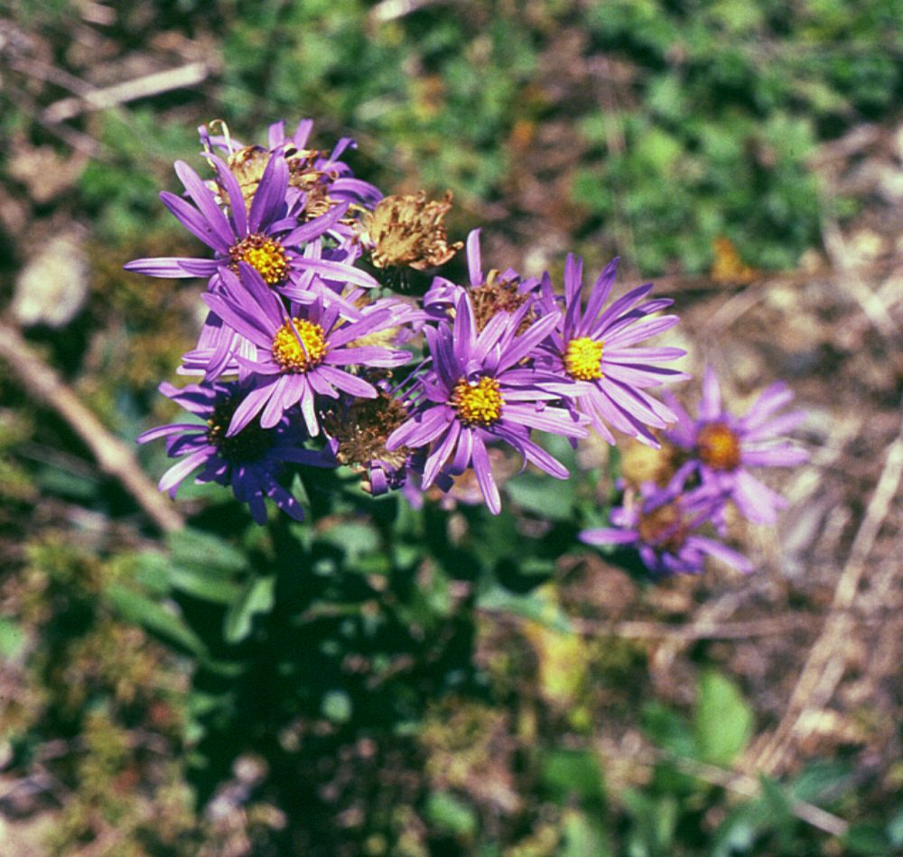 Kalk-Aster (Aster amellus), Korbblütler (Asteraceae) - Österreich/Austria/Autriche: Niederösterreich, Kamptal, bei Kamegg, auf Marmor